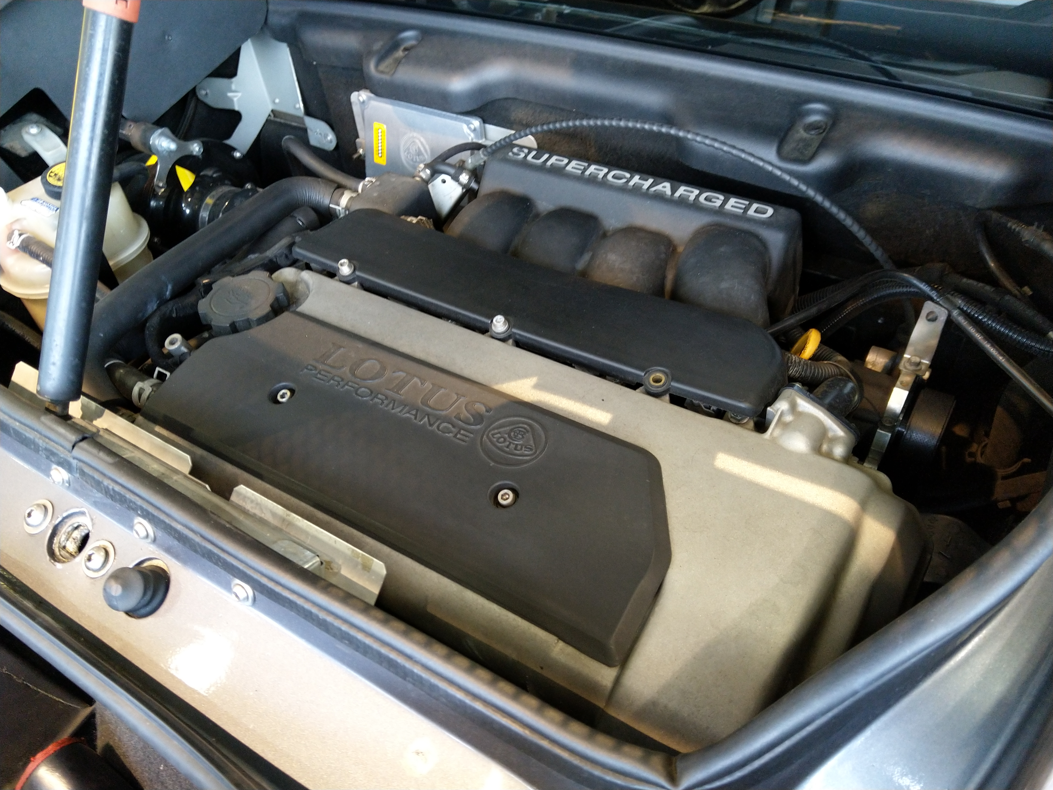 Deze foto is genomen in de showroom van Van der Kooi Sportscars in Houten.